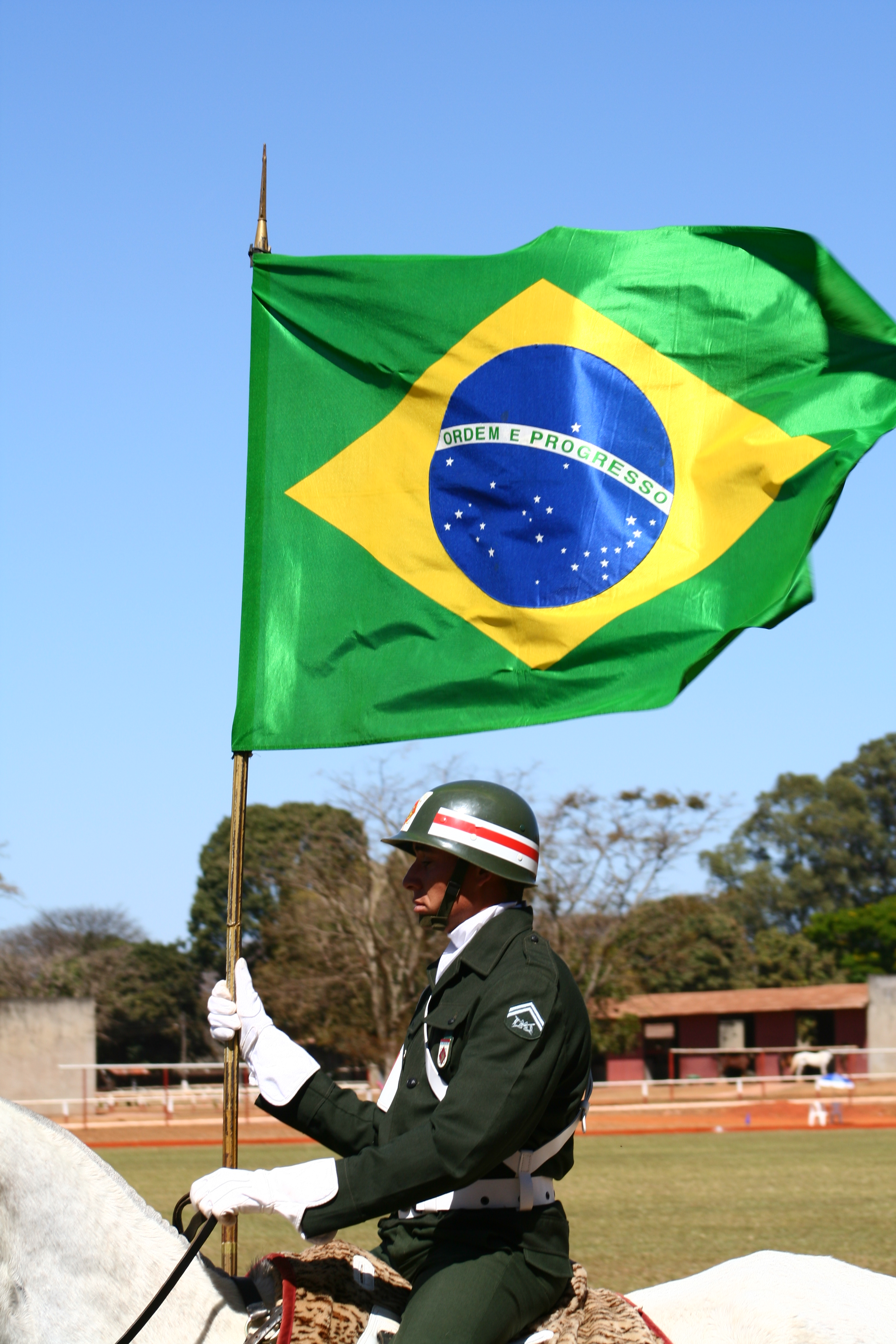 Apresenta��o dos Drag�es da Independ�ncia